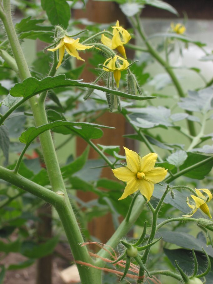 Bloeiende tomaat.